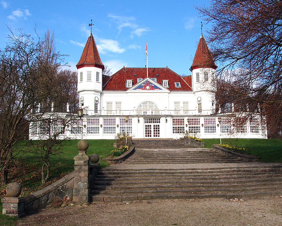 Varna Palæet er en skovrestaurant i Marselisborg Skov syd for Århus. Den er er opført 1908-1909 i forbindelse med Landsudstillingen i Århus i 1909. Den er tegnet af arkitekten Eggert C. Achen (1853-1913). Varnapalæet